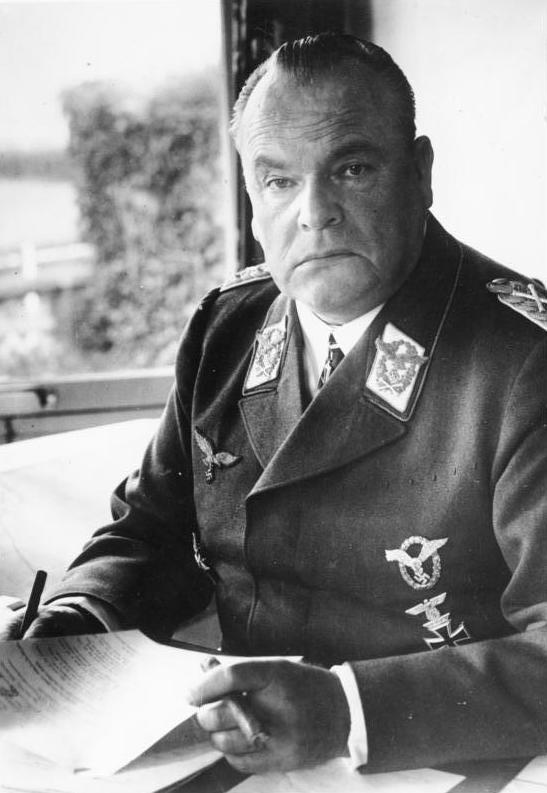 Generalfeldmarschall Sperrle Wie der Bericht des Oberkommandos der deutschen Wehrmacht am 13. Februar 1942 bekannt gab, kam es zwischen den deutschen Schlachtschiffen "Scharnhorst" und "Gneisenau", sowie dem großen Kreuzer "Prinz Eugen" und feindlichen Flotteneinheiten zu Gefechtsberührungen. Im Verlauf der sich entwickelnden Kämpfe, bei denen die Engländer auch zahlreiche Luftstreitkräfte einsetzten, verloren die Briten bei nur 7 eigenen Verlusten 43 Maschinen. An dieser hohen Abschußziffer hatten die Luftwaffenverbände des Generalfeldmarschalls Sperrle einen hervorragenden Anteil. UBz: Generalfeldmarschall Sperrle. PK Fischer Orbis 2. TEXT: Neueste Aufnahme von Generalfeldmarschall Sperrle. (Herausgabe-Datum 20. Februar 1942)